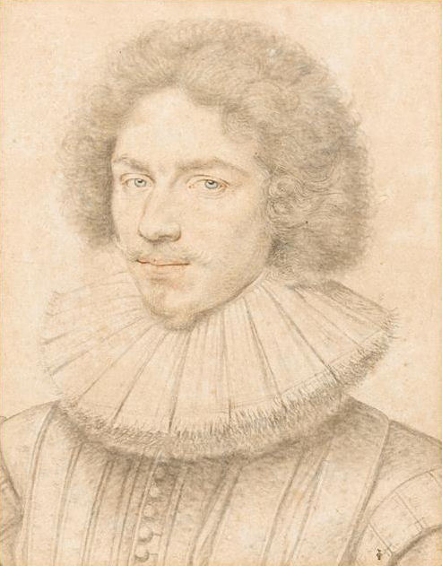 Louis de Vendôme, duc de Mercoeur (1612-1669), H. 0,381 ; L. 0,300. Chantilly, musée Condé, PD 417.